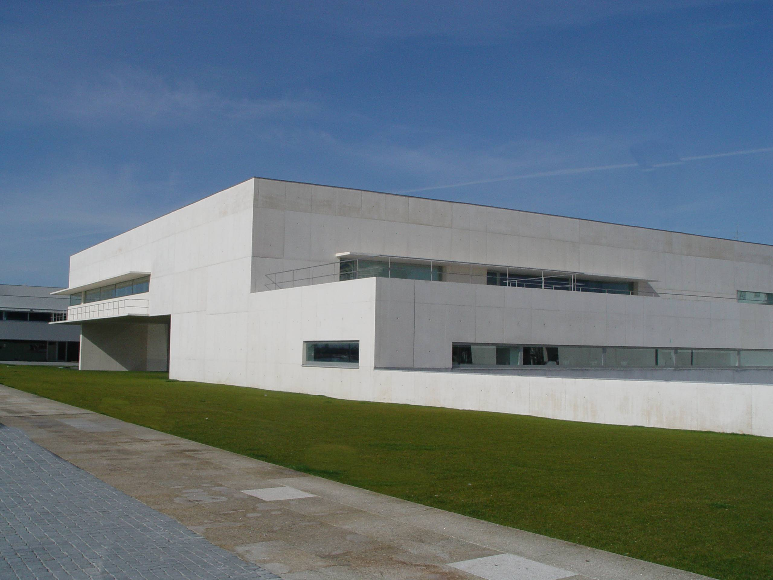 Public library in Viana do castelo, Portugal